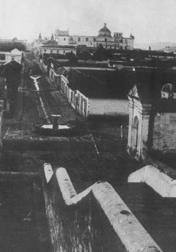 Iglesia de El Calvario de la Ciudad de Guatemala en 1880 aproximadamente. Al fondo, la iglesia de San Francisco cuando el claustro de los terciarios todavía tenía sus dos estructuras piramidales.